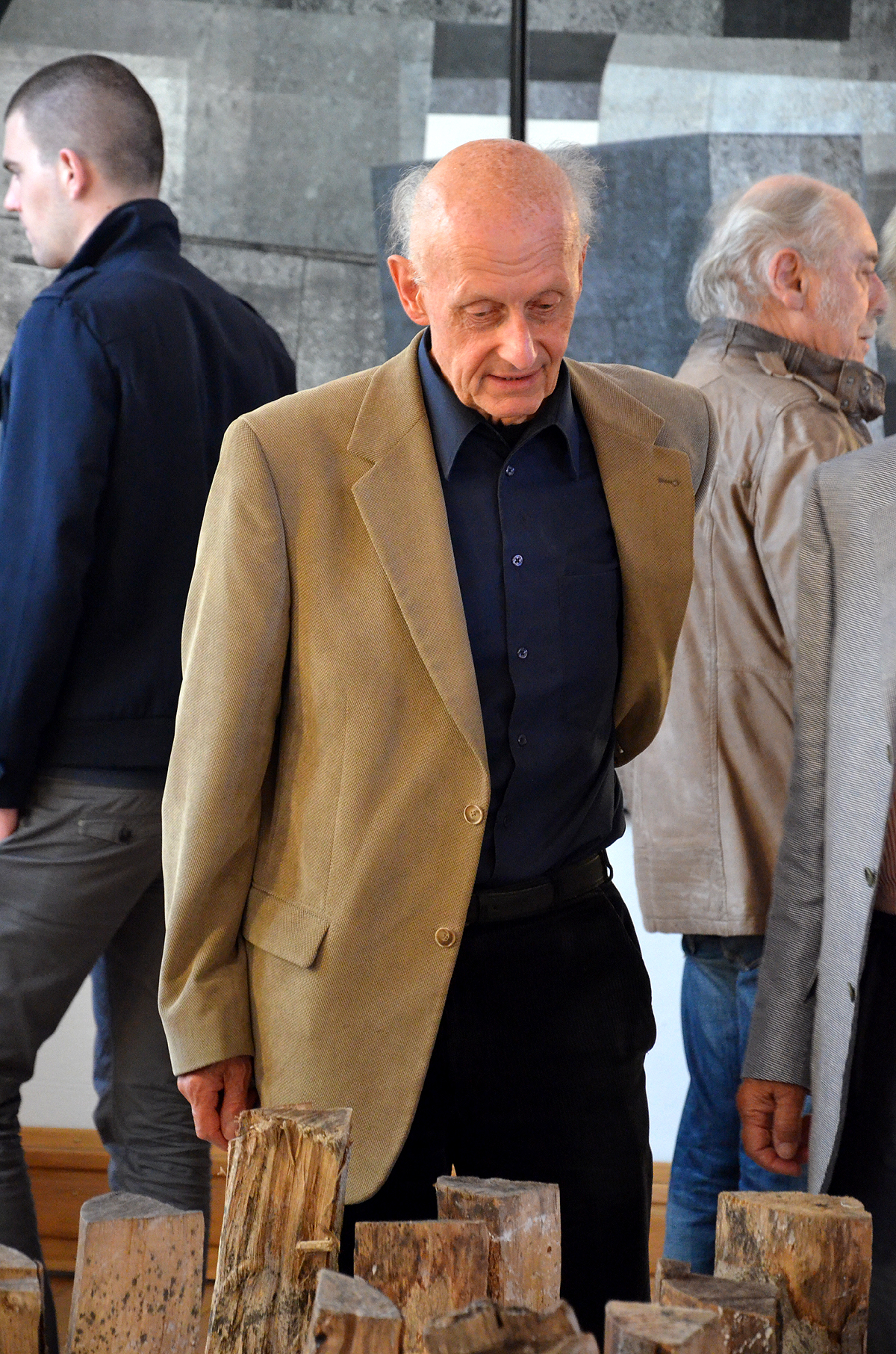 Momentaufnahme der Vernissage der Ausstellung Niemandsland, der Retrospektive des Künstlers János Nádasdy auf Schloss Landestrost vom 21. Juni bis zum 3. August 2014 ...